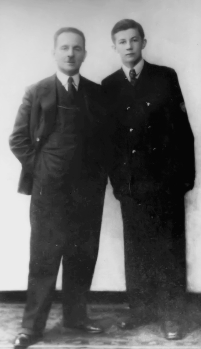 Остап Луцький разом з сином Юрієм (1936 р.).